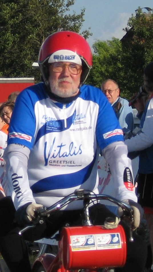 Dieter Durst mit Derny